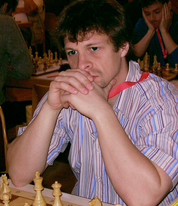 Vasily Yemelin, 15. Internationales Neckar-Open (April 2011 in Deizisau).